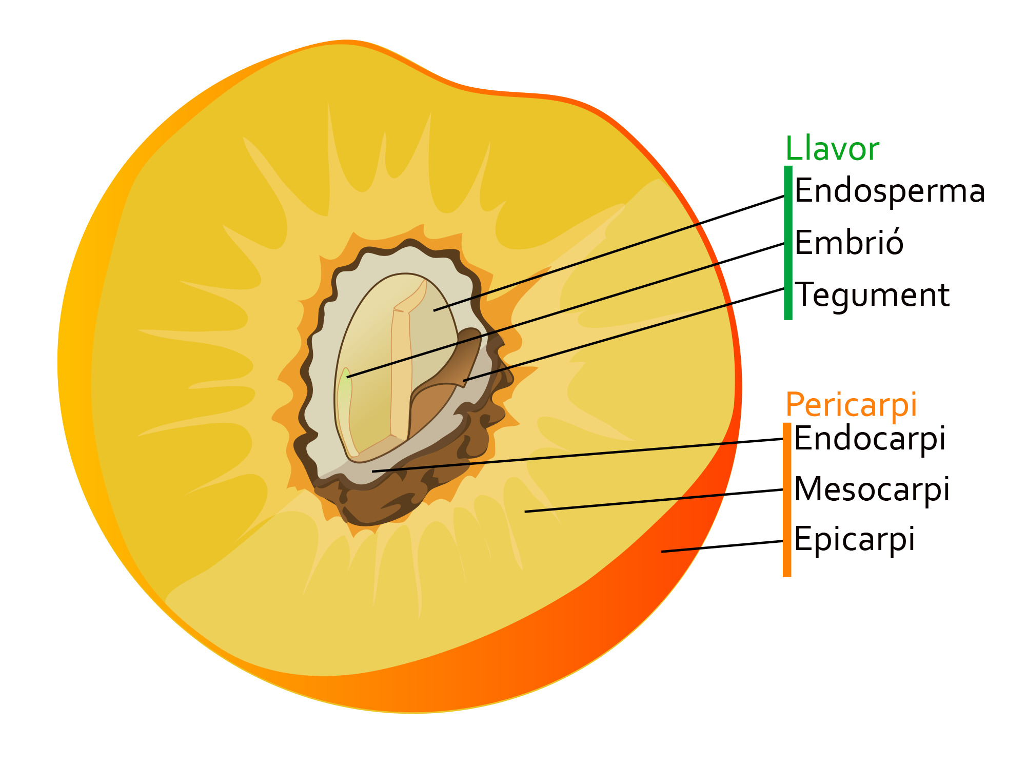 Préssec com exemple de drupa d'endocarpi dur.